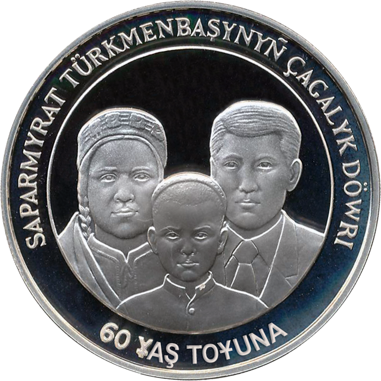 60 лет Сапармурату Ниязову